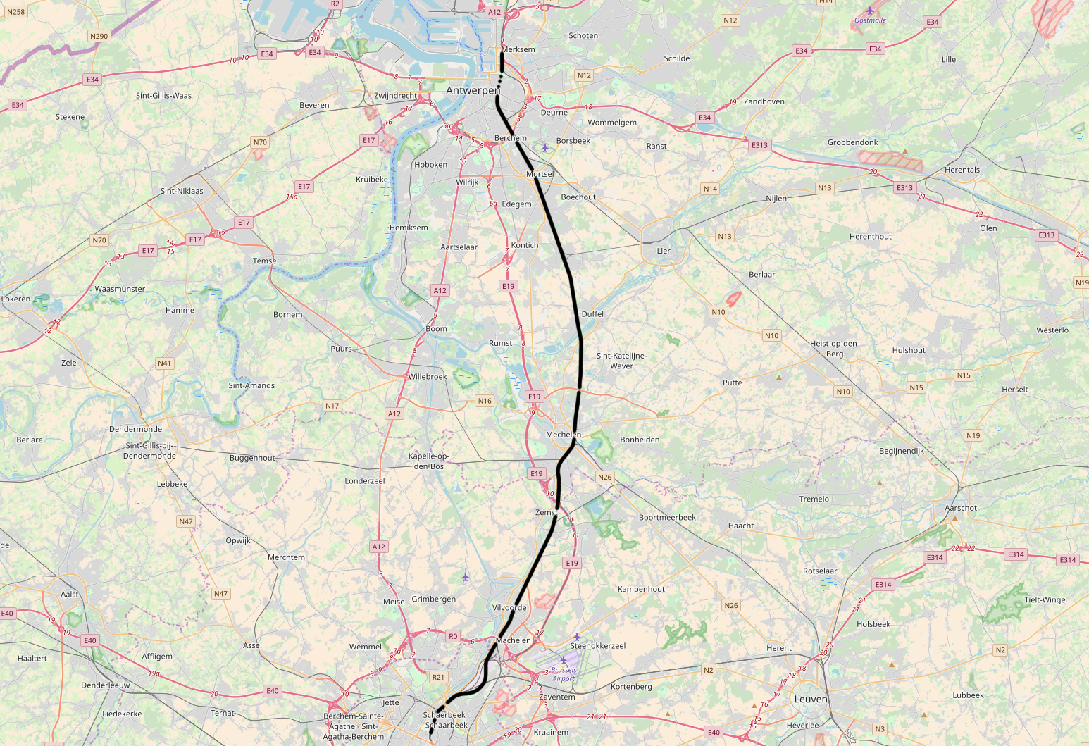 Belgian Railway Line 25, Brussel-Noord - Antwerpen-Luchtbal